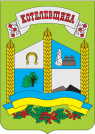 Герб Котелевського району